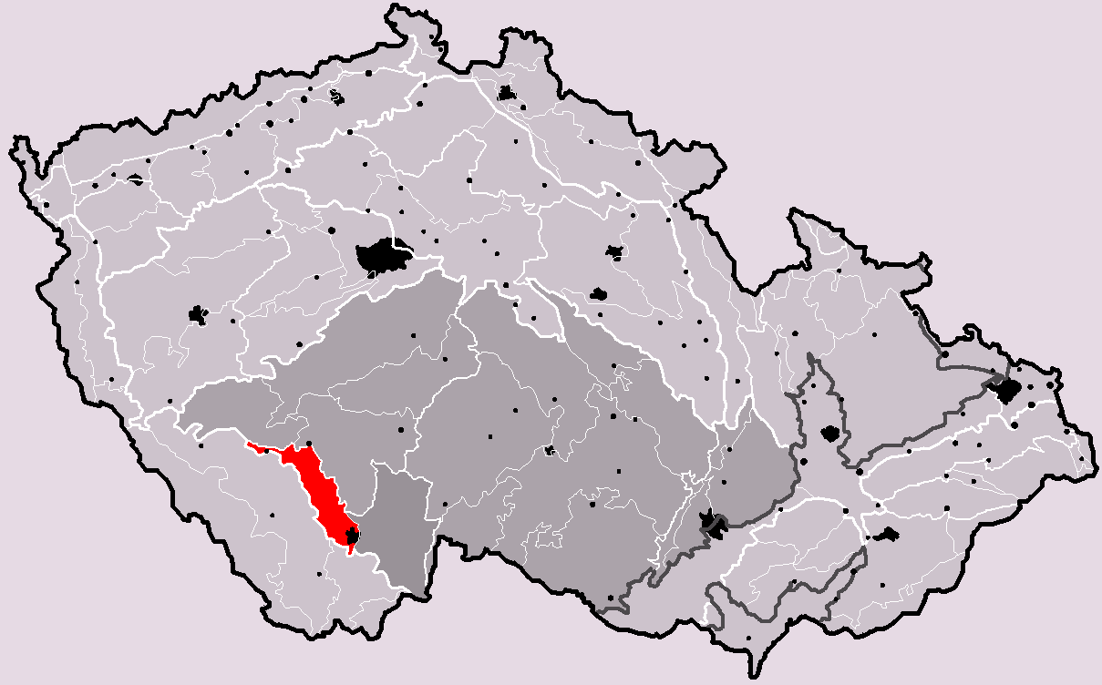 Poloha geomorfologického celku Českobudějovická pánev v rámci České republiky. Hercynský systém Hercynská pohoří I Česká vysočina I2 (II) Česko-moravská subprovincie I2B (IIB) Jihočeské pánve I2B-1 (IIB-1) Českobudějovická pánev